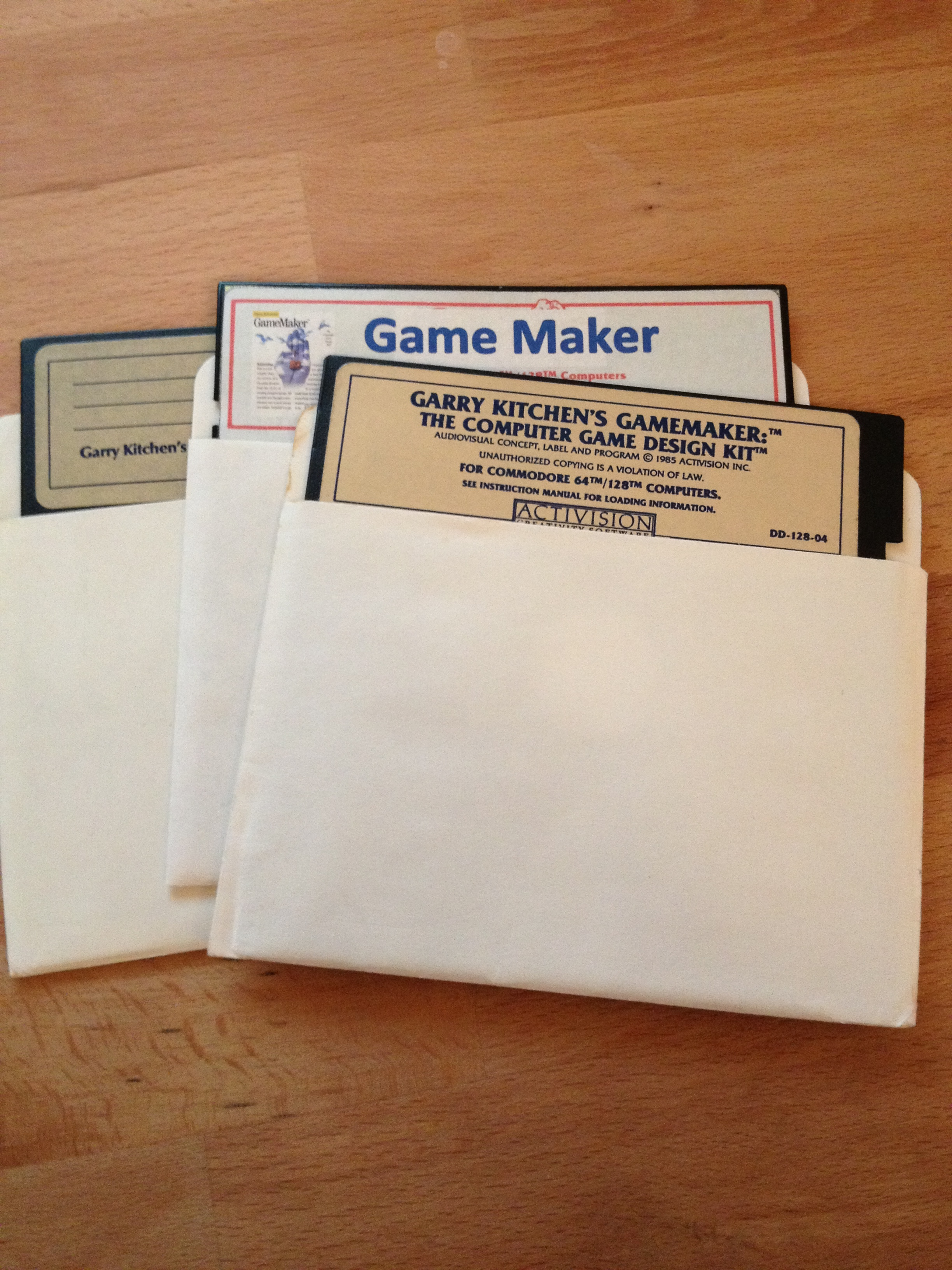 Garry Kitchens Game Maker Disks für den C64 und C128